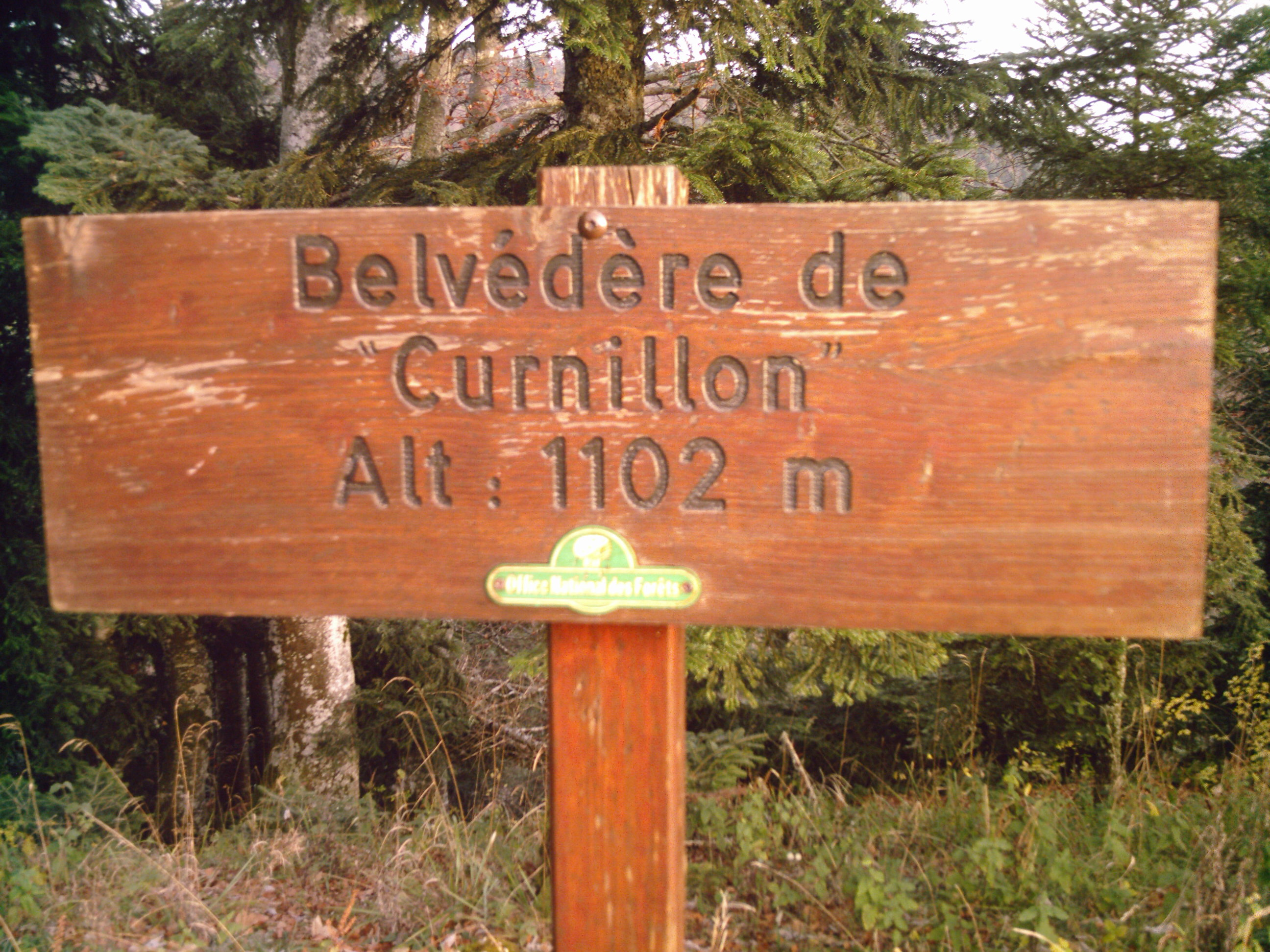 Panneau marquant le belvédère du Curnillon, situé à 1102 mètres d'altitude.